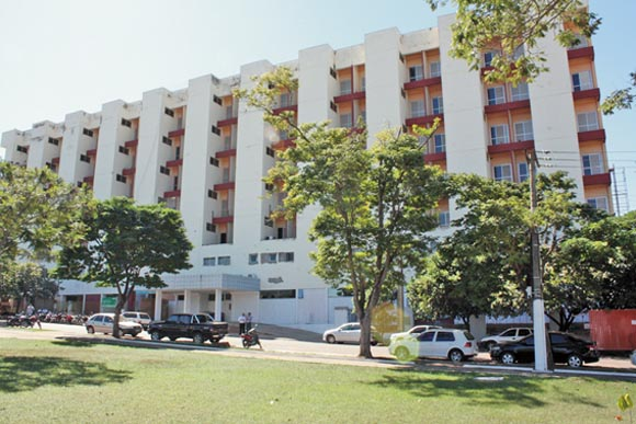 SNTA CSA ROO